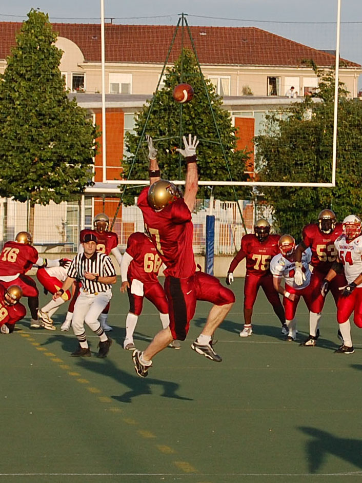 Demi-finale du championnat de France Elite de football américain Templiers d'Elancourt - Argonautes d'Aix-en-Provence, le 14 juin 2008 à Elancourt